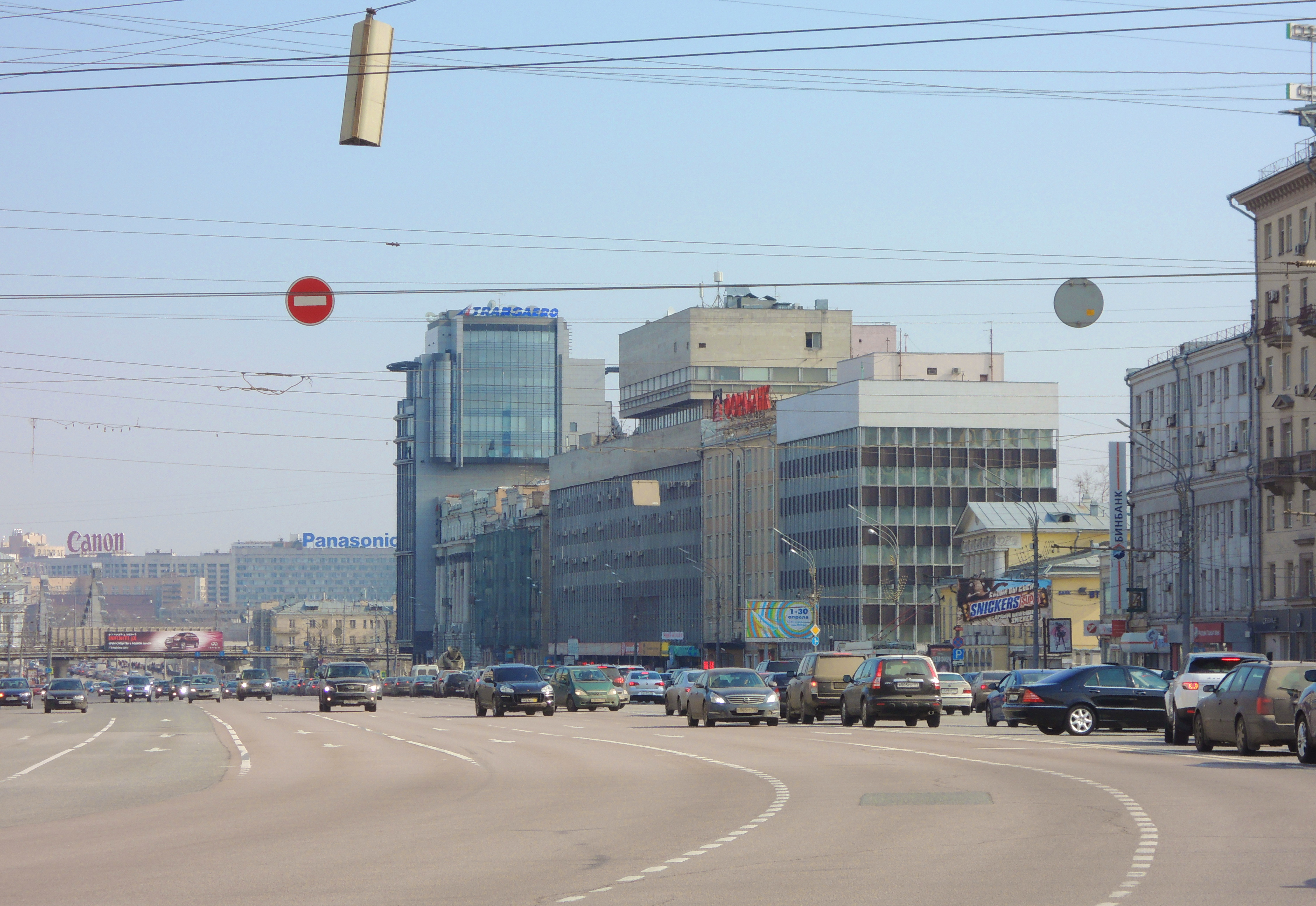 Zubovsky Boulevard